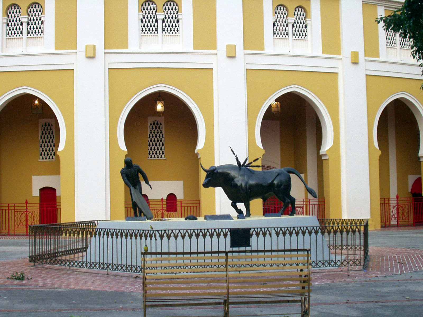 Plaza de Toros Cesar Girón Maestranza de Maracay